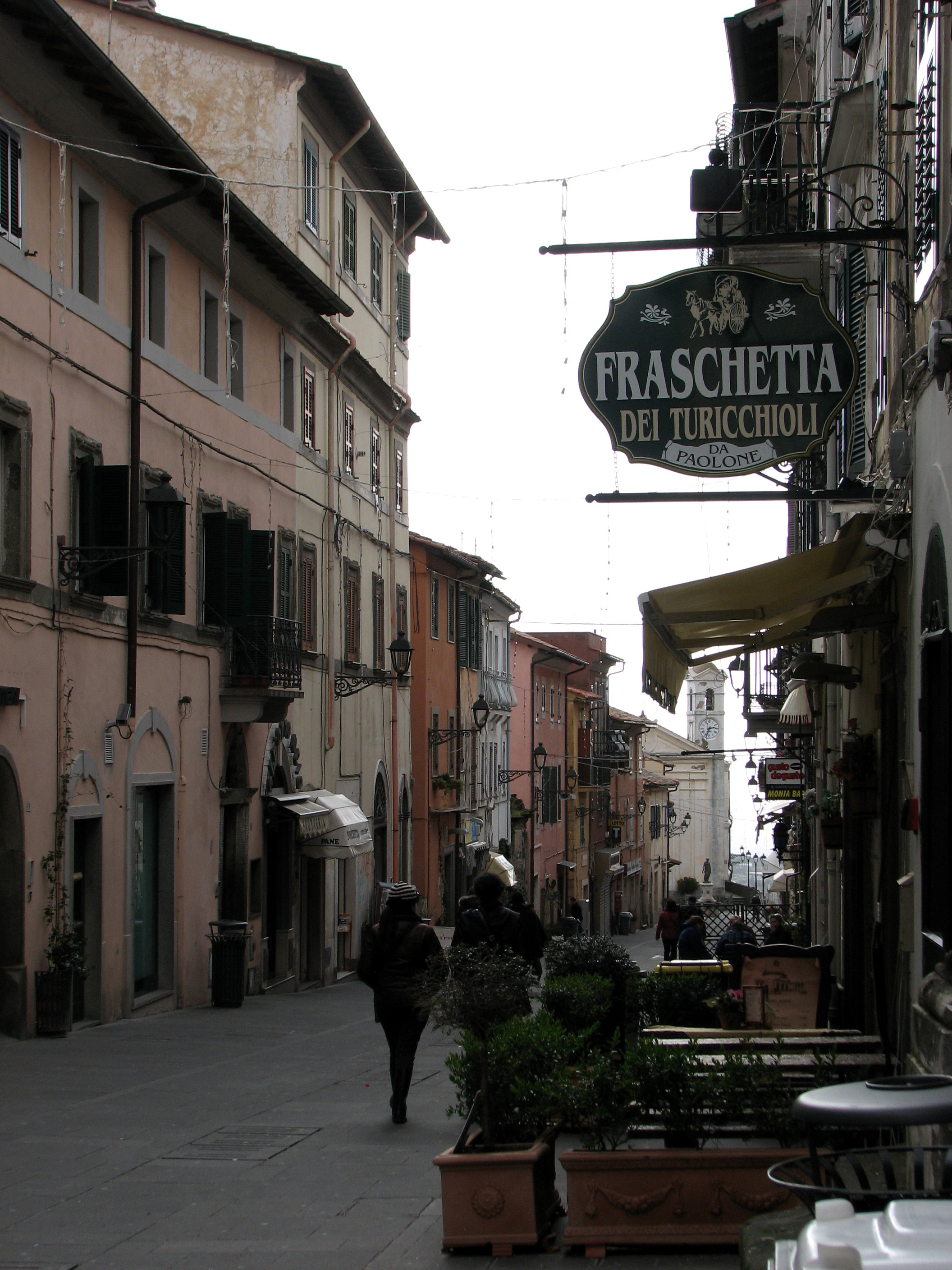 Insegna di una fraschetta ad Ariccia - Italia.